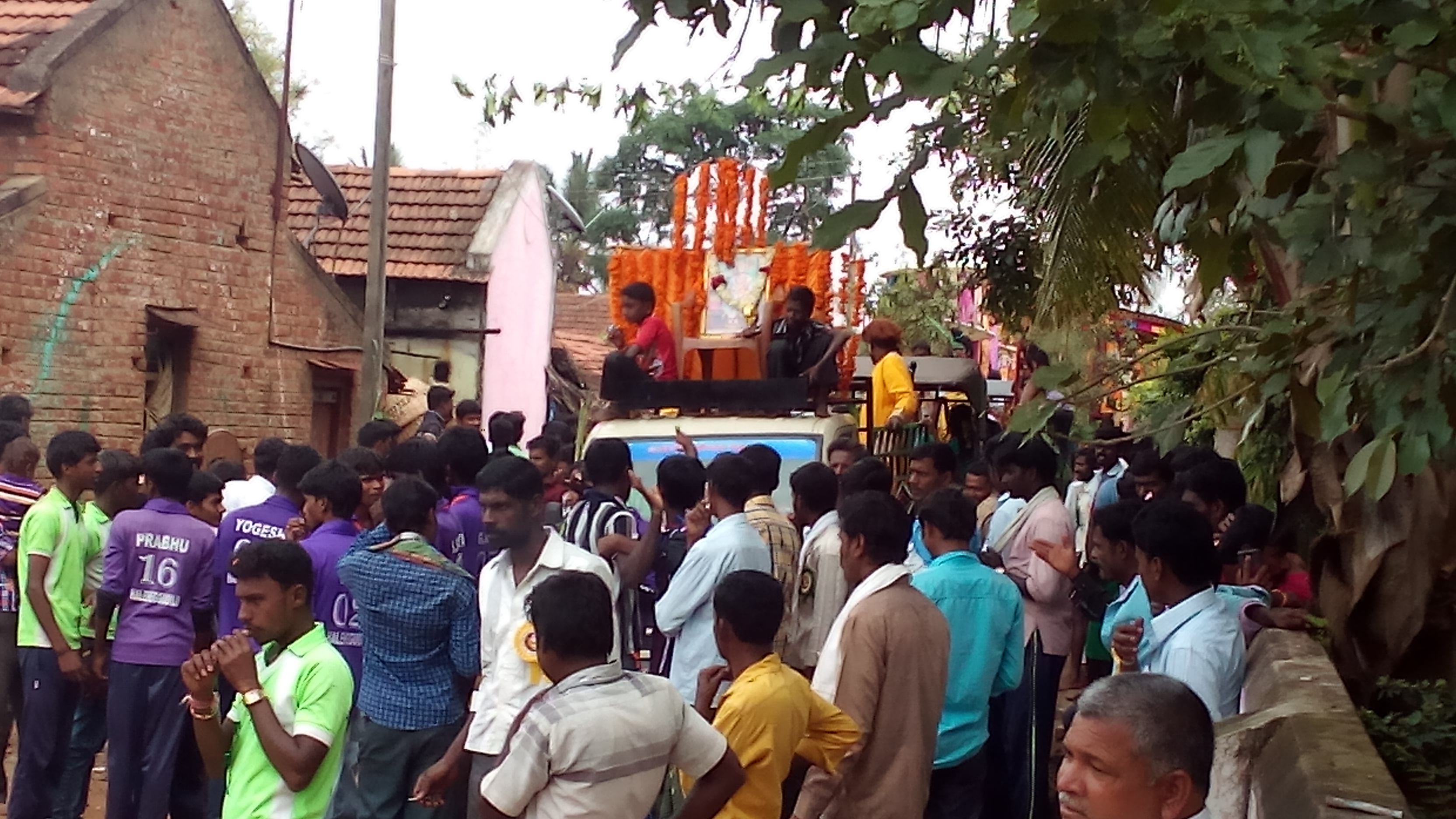 ಕನ್ನಡ: ಗ್ರಾಮದಲ್ಲಿ ವಾಲ್ಮೀಕಿ ಜಯಂತಿಯನ್ನು ಆಚರಿಸುತ್ತಿರುವುದು